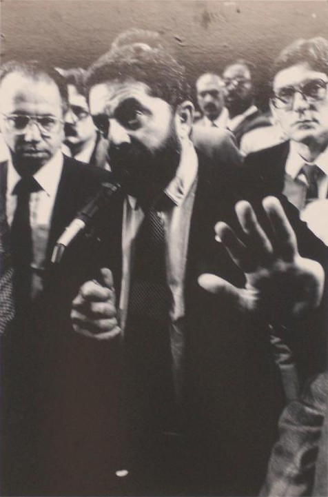 Brasília - Foto do ex-deputado Luiz Inácio Lula da Silva falando no plenário da Câmara dos Deputados, na exposição de fotos dos 15 anos da Constituinte - (Foto Roosewelt Pinheiro/ABr - vert. 32)